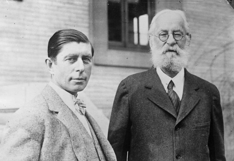 Knud Rasmussen, der bekannte Polar- und Eskimoforscher, vor einer neuen Grönland-Expedition ! Knud Rasmussen (links) mit dem bekannten Geologen und Nordpolarforscher Major Greely, welche sich mit der Ausarbeitung einer neuen Grönland-Expedition befassen.